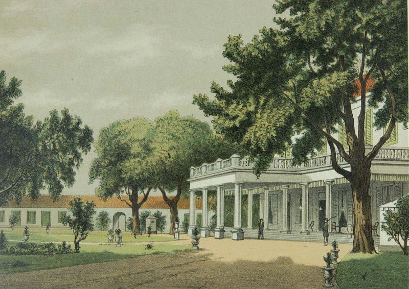 Litho. Litho naar een oorspronkelijke aquarel van J. Rappard.. Het huis van de resident in Surabaya